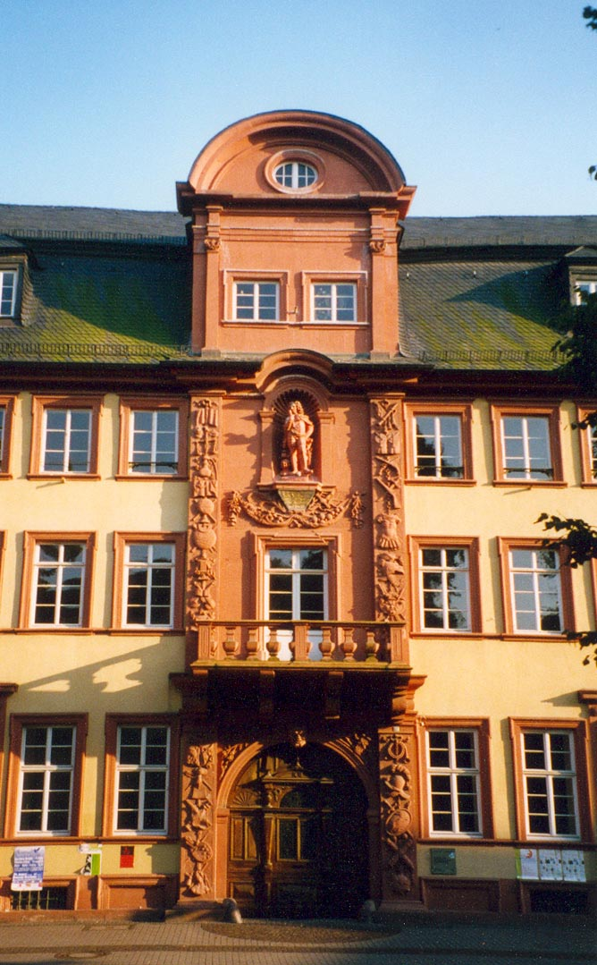 Heidelberg : Barockbau "Haus zum Riesen", erbaut 1707-08 von Johann Adam Breunig. Im Bild der Mittelrisalt der Vorderseite.